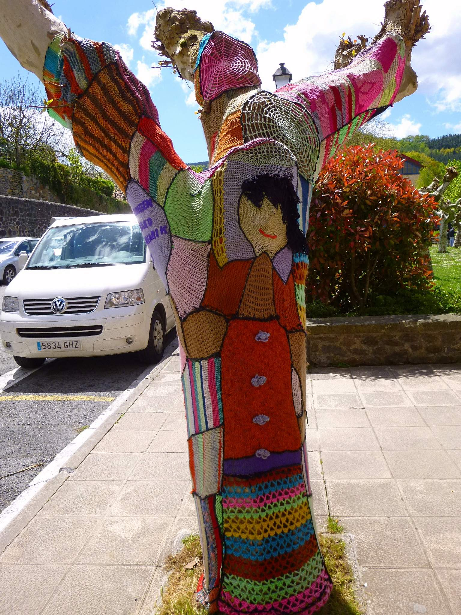 Yarn bombing (o knitted graffiti, graffiti de punto) en Ibarra de Aramayona (Aramaio), en Álava